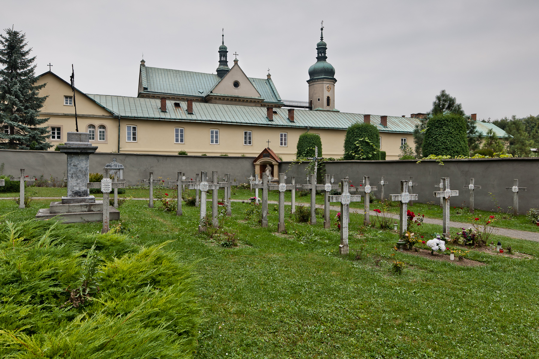 Zespół klasztorny OO. Karmelitów, Czerna - widok na klasztor